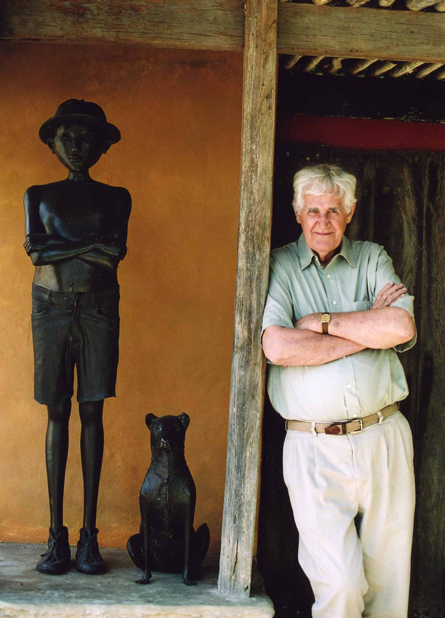 Cornelis Zitman voor de deur van zijn woning en atelier in Caracas, met naast hem twee door hem gemaakte beelden.